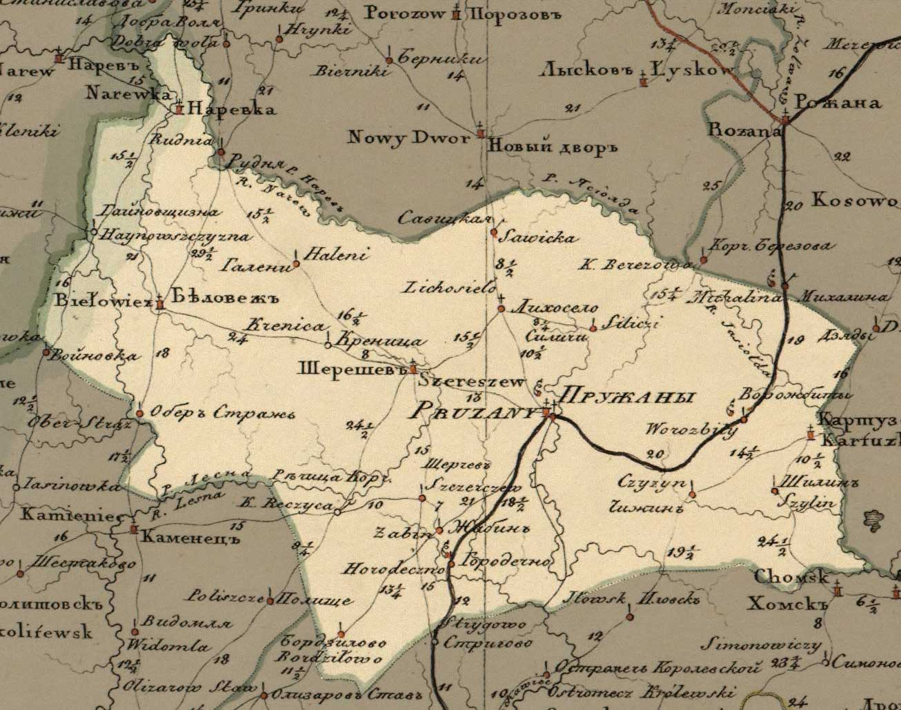 Беларуская (тарашкевіца): Пружанскі павет на генэральнай мапе Гарадзенскай губэрні і Беластоцкай вобласьці (фрагмэнт)